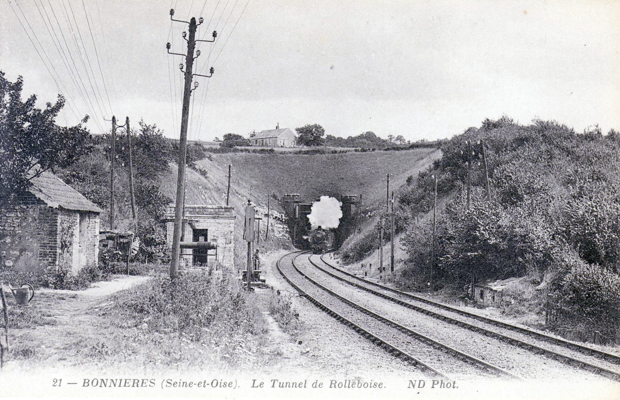 Tunnel de Rolleboise à Bonnieres (Seine et Oise)